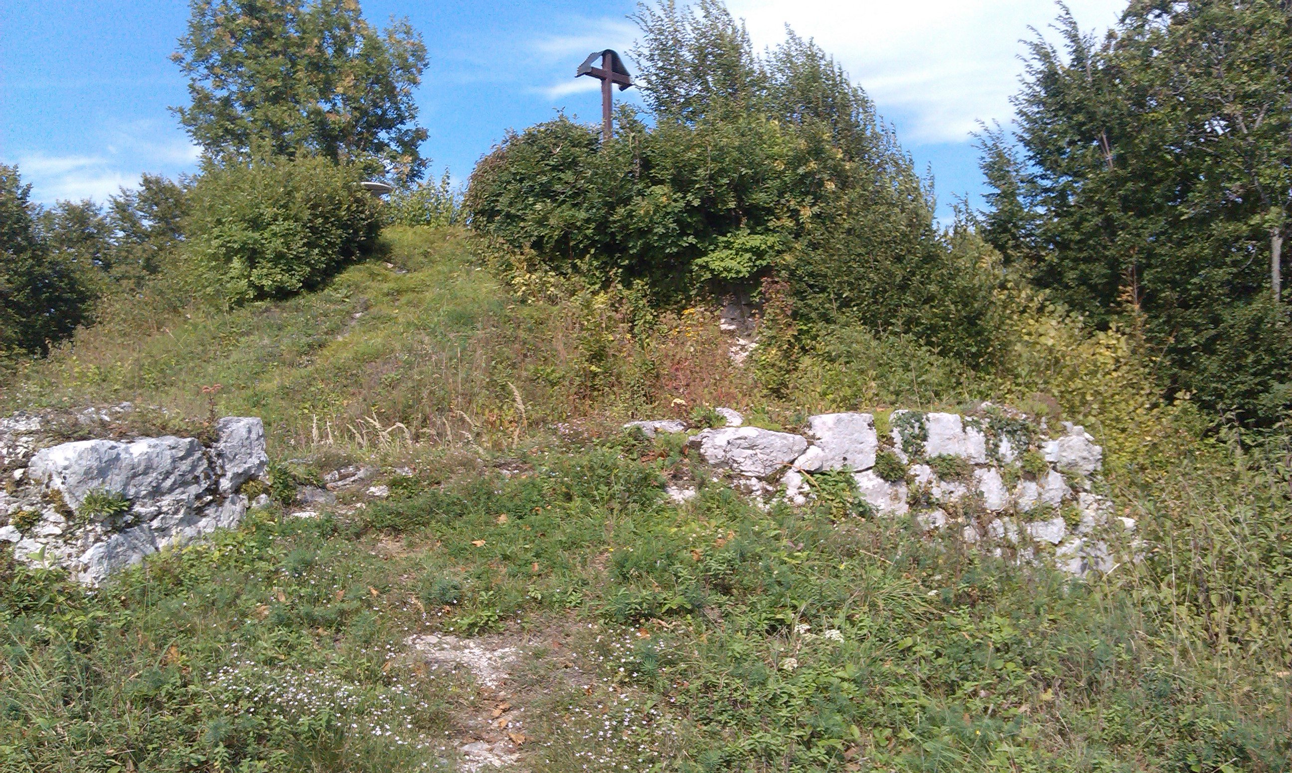 Grad Mehovo leta 2015